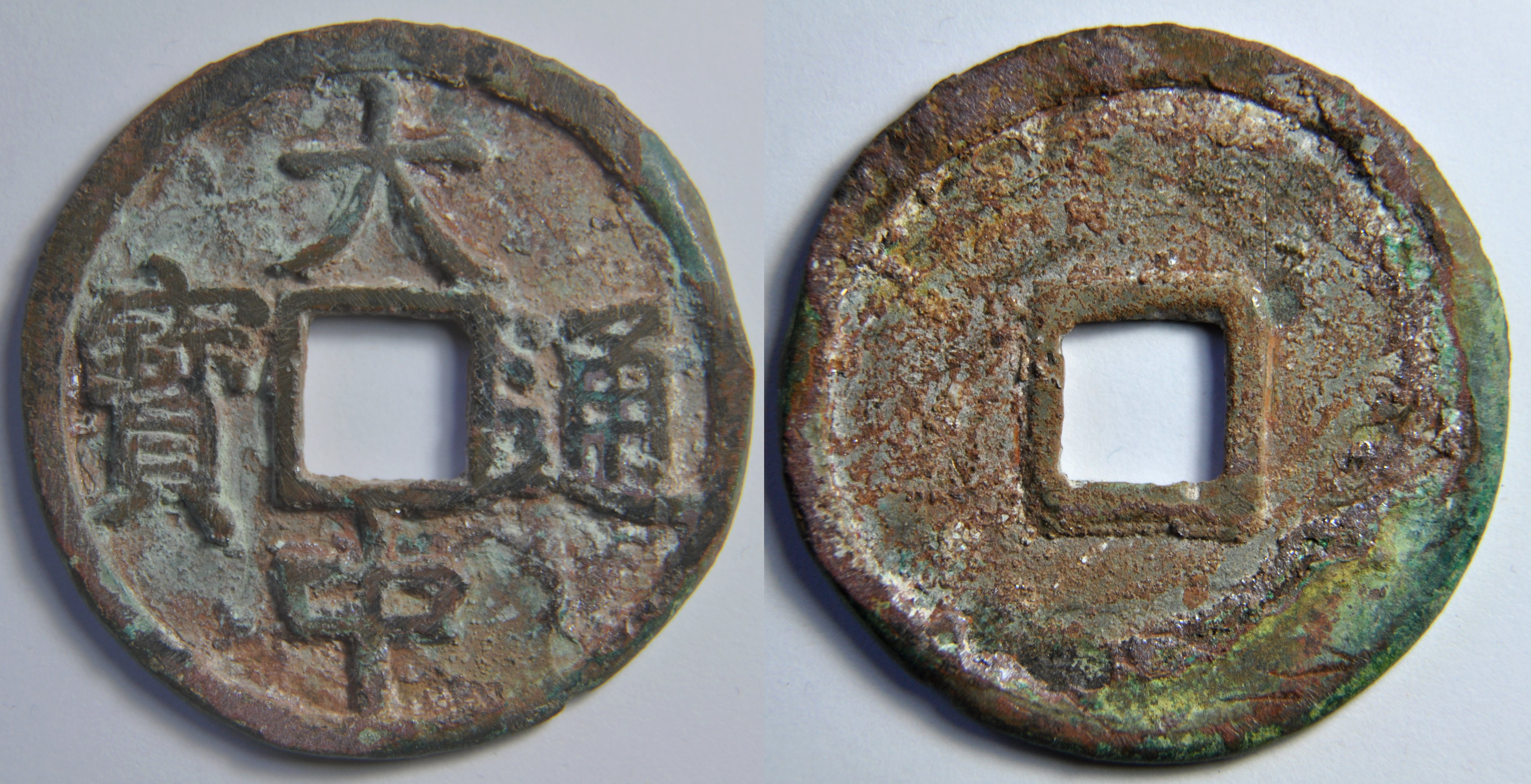 Une monnaie en cuivre ou en bronze de 3 sapèques (3 cash) de Zhu Yuanzhang, futur premier empereur (Tai Zu, ère Hong Wu, 1368-1398) de la dynastie Ming, en tant que duc de Wu puis roi de Wu. En 1361, il obtient ce titre de l'empereur rebelle, Han Lin'er (1355-1366), de la dynastie Song (1355-1366). Il prend le nom d'ère de Da Zhong (1364-1368). A l'origine, ce personnage était un paysan devenu moine bouddhiste par nécessité. Il intègre la révolte des Turbans rouges et devient général. A/ Da Zhong tong bao (Monnaie courante de l'ère Da Zhong) R/ Vide Dimension : 33.15 mm Poids : 6 g. Référence : H20.33 Indice de rareté : 11 (Commune) (D'après D. Hartill) Remarque : Cette monnaie n'est pas si commune et est assez difficile à trouver dans cet état (XF).